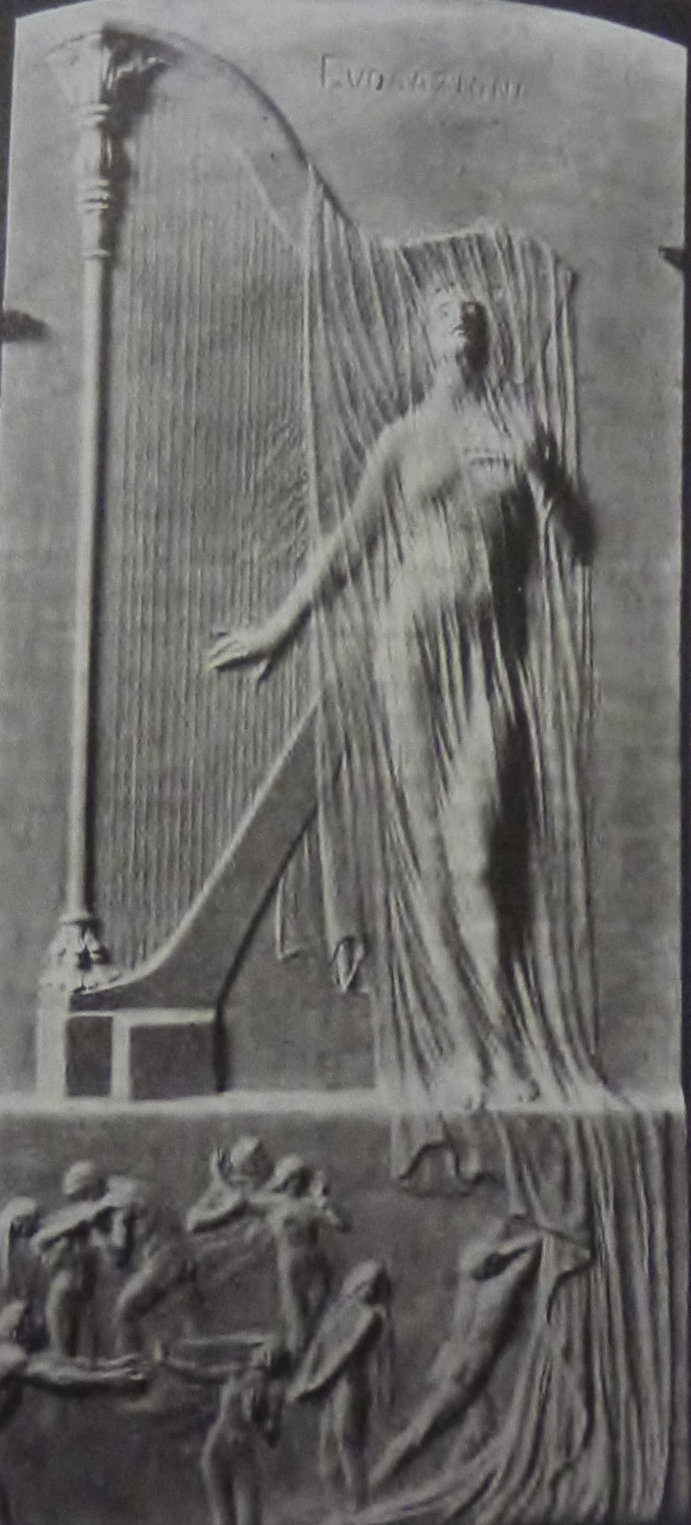 Адель Вернер рельеф Призыв 1914 год из журнала Нива 1914 № 27